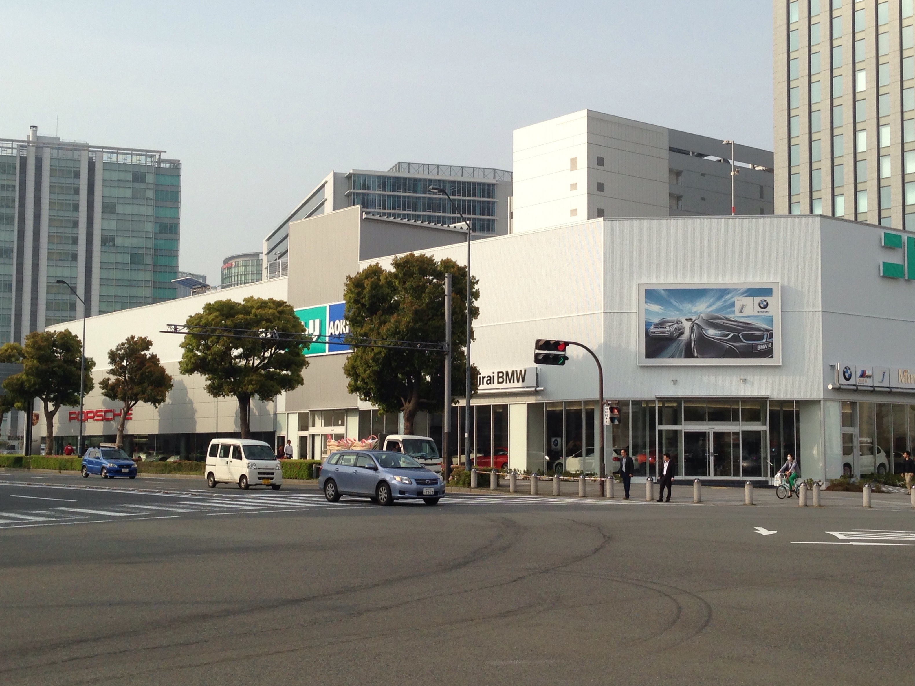 横浜みなとみらい地区の商業施設「PRYME GALLERY みなとみらい」。自動車のショールームやニトリなど店舗が入る。